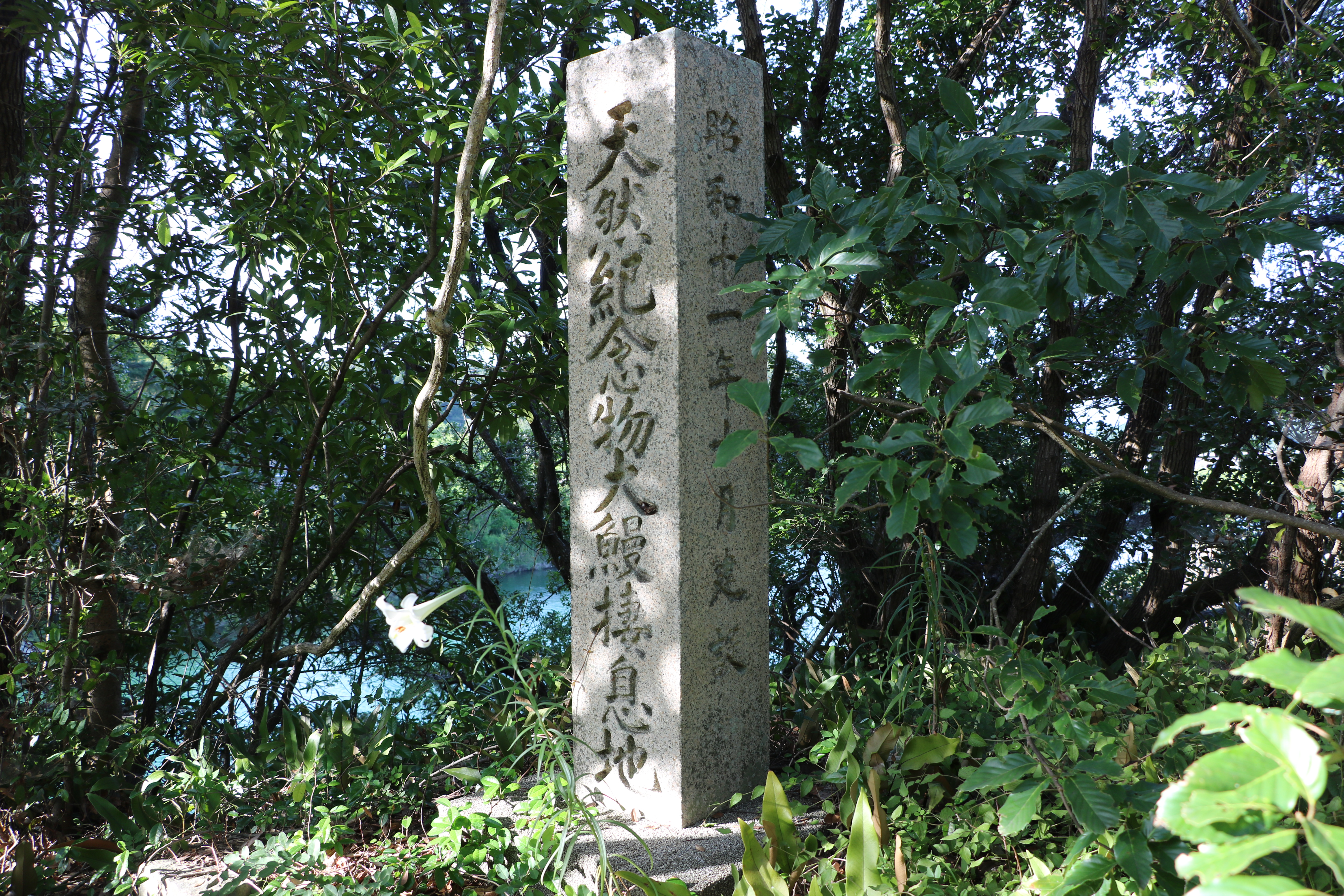 富田川のオオウナギ生息地。濁り淵（国指定天然記念物、和歌山県白浜町）天然記念物石碑。